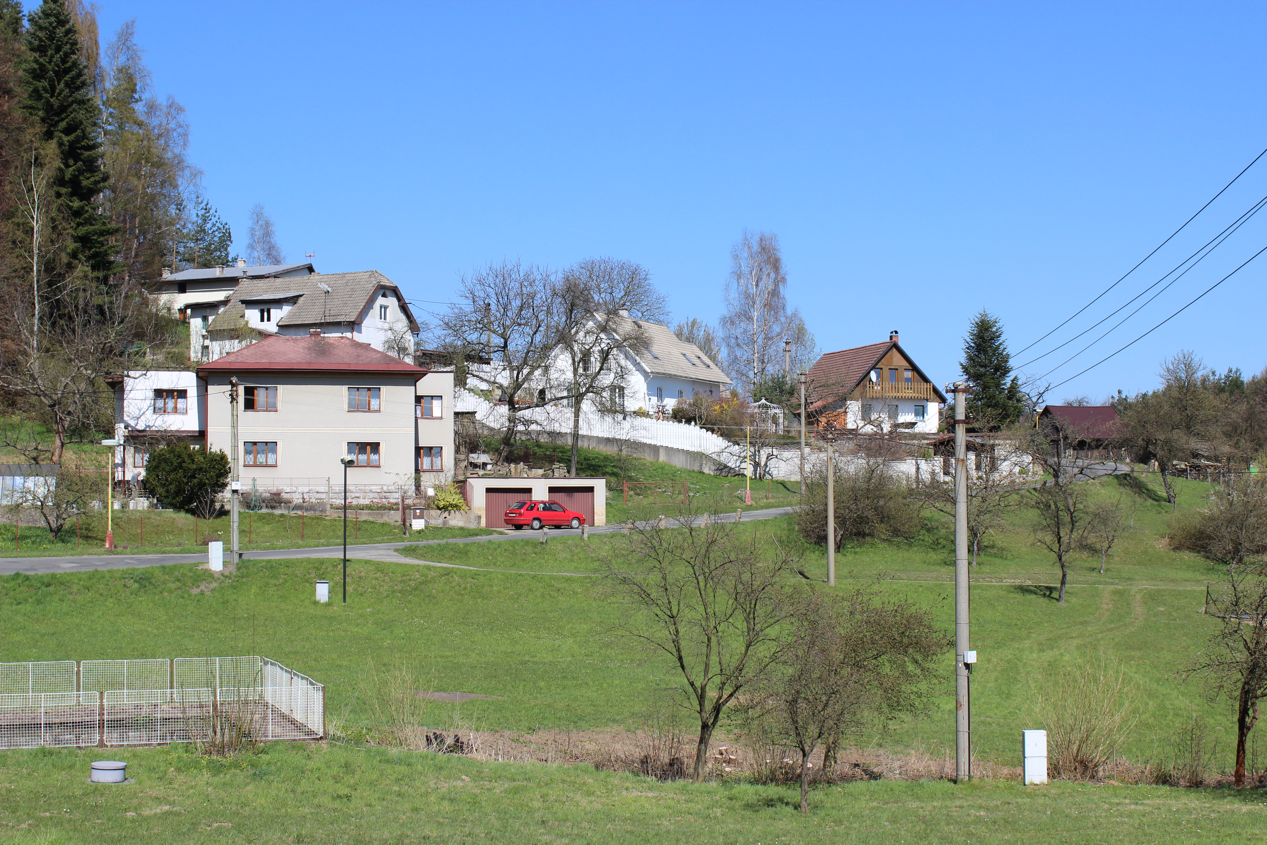 Celkový pohled na příjezd od Besedic do Michovky, části Koberovy.